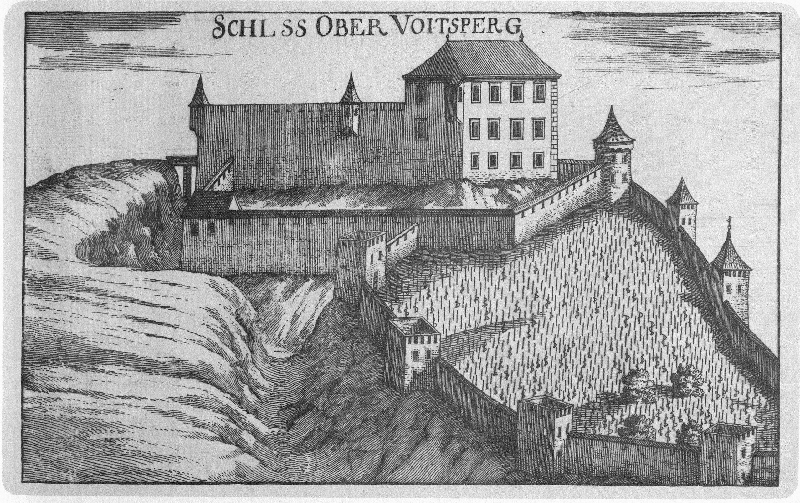 G. M. Vischers Käyserlichen Geographi, Topographia Ducatus Stiriae, Das ist: Eigentliche Delineation / und Abbildung aller Städte / Schlösser / Marcktfleck / Lustgärten / Probsteyen / Stiffter / Clöster und Kirchen / so es sich im Herzogthumb Steyrmarck befinden; Und anjetzo Umb einen billichen Preyß zu finden seynd Bey Johann Bitsch Universitäts Buchhandlern / Auff dem Juden=Platz bey der guldenen Saulen. Graz 1681 Die Nummerierung der Dateien folgt der alphabetischen Reihung der Ortsnamen und entspricht nicht dem Vischer-Register